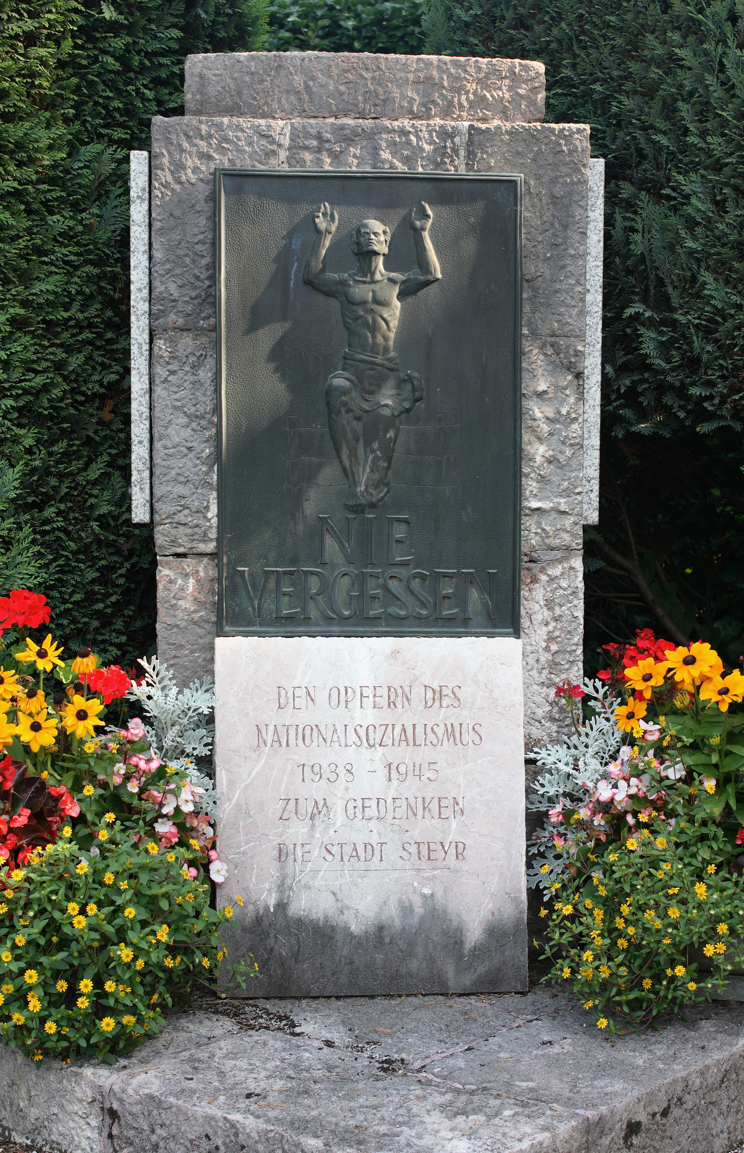 Mahnmal am Steyrer Urnenfriedhof (Tabor)